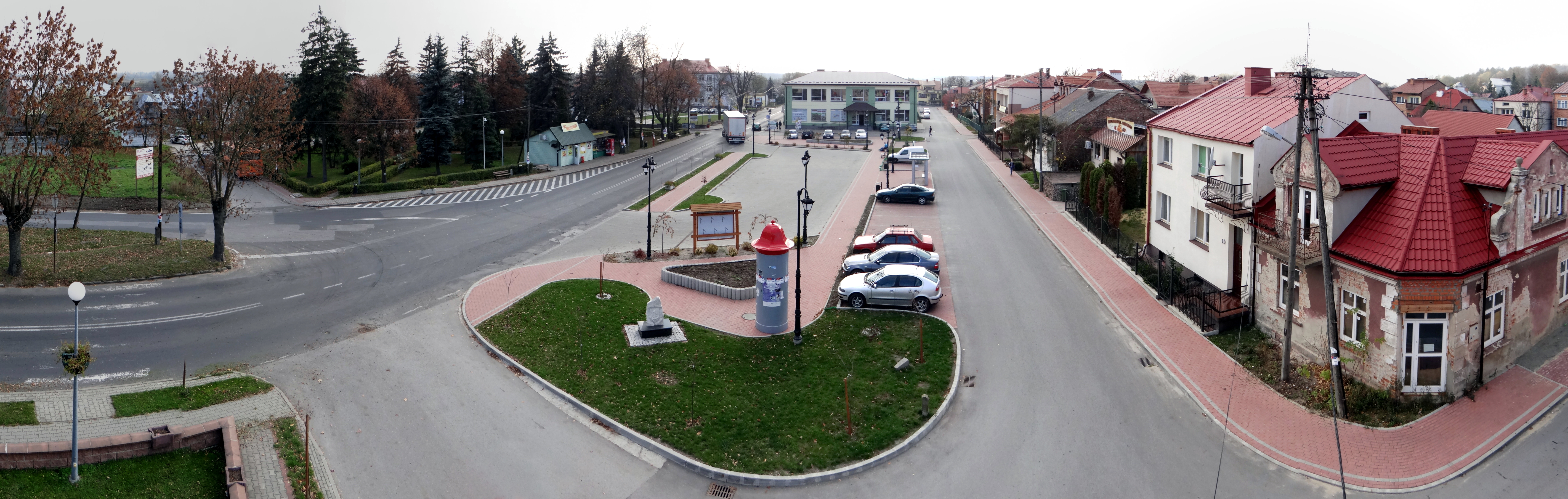 Panorama Rynku w Krzeszowie